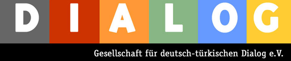 Wortmarke des Vereins Dialog e. V. – Gesellschaft für deutsch-türkischen Dialog, Duisburg